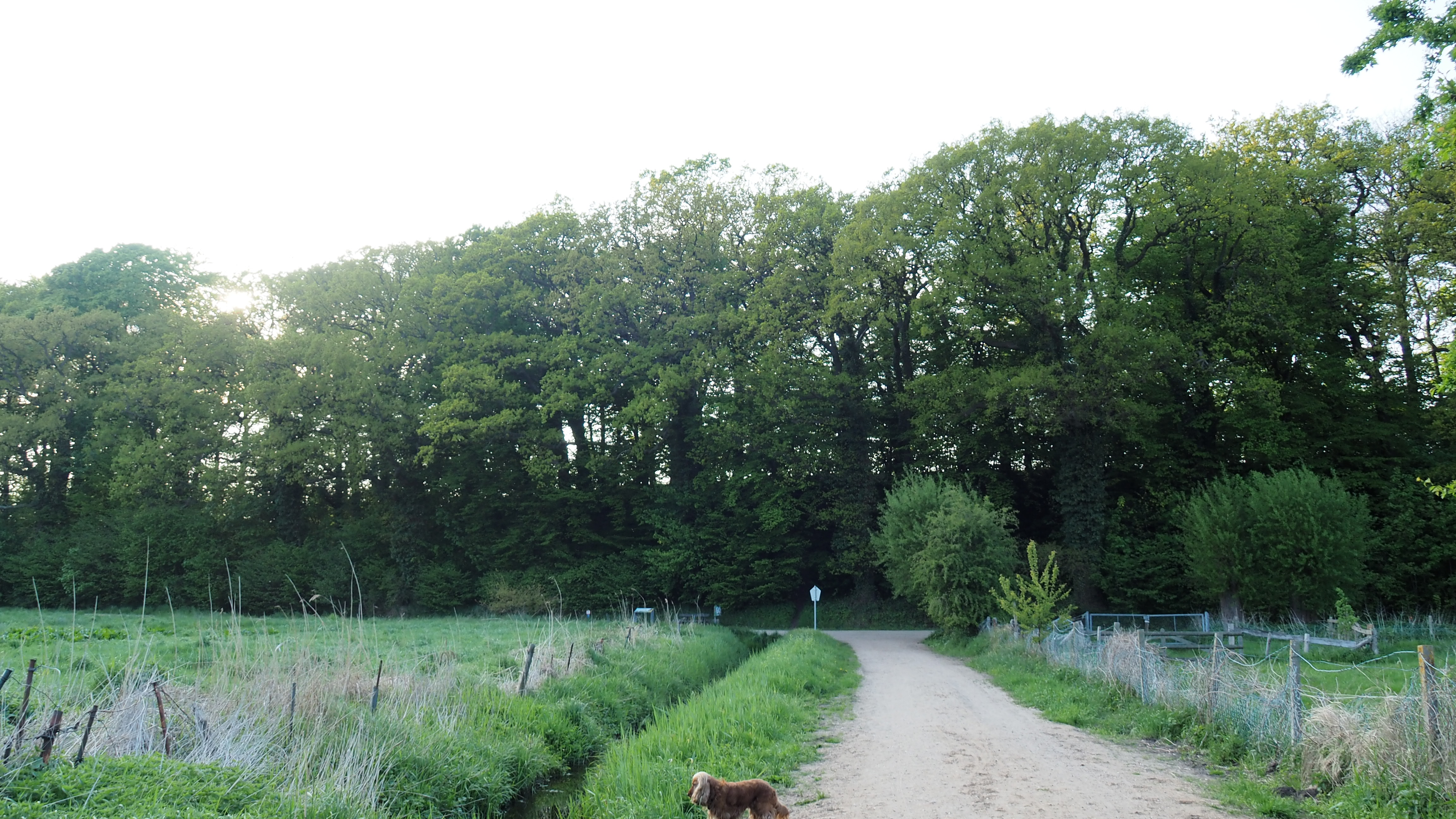 Kliff zwischen Rettin und Pelzerhaken